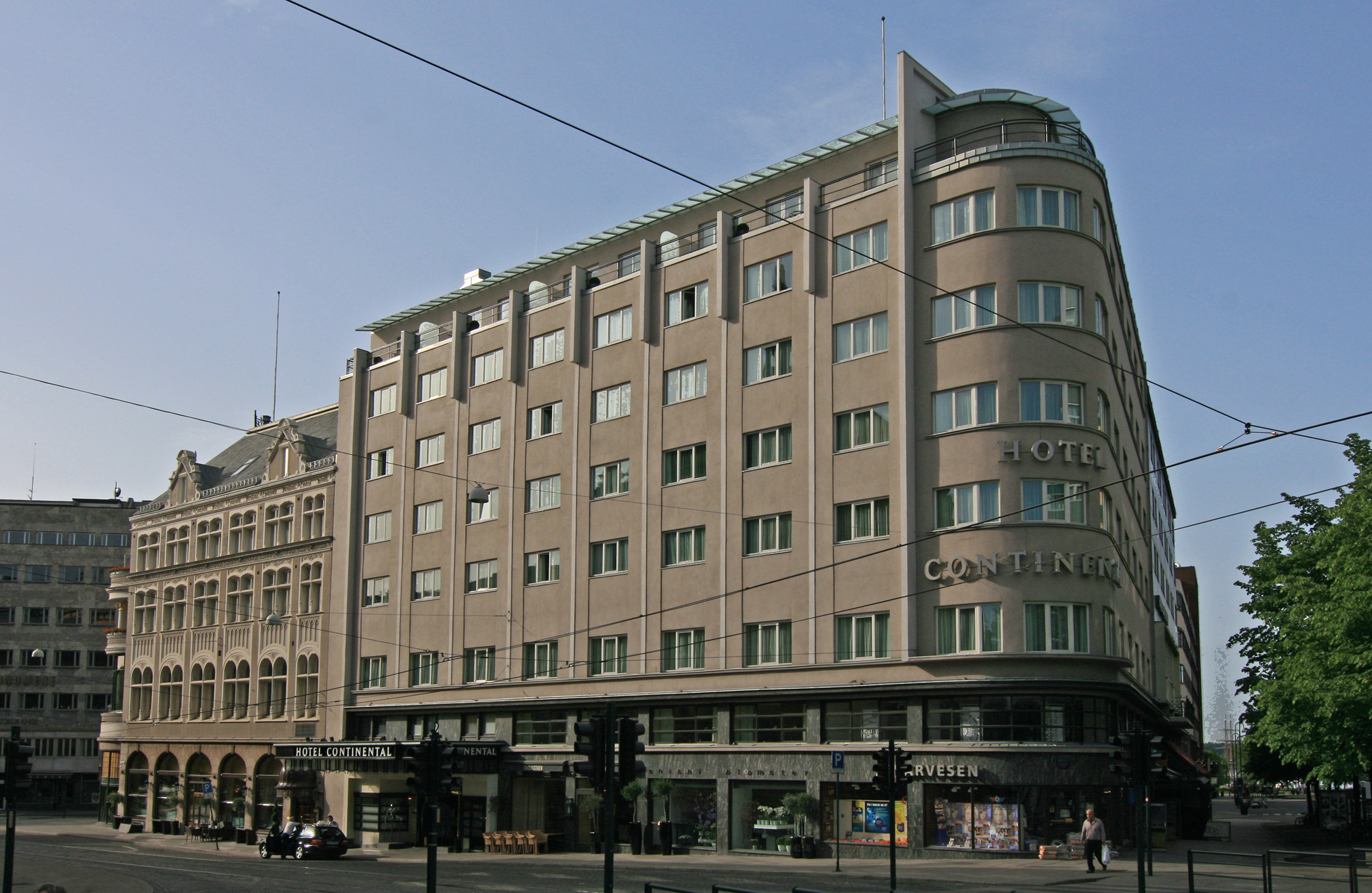 Hotel Continental, Oslo. Eldste del bygd 1900; arkitekt Ivar Cock. Nyeste del bygd 1932; arkitekt Ole Øvergaard.